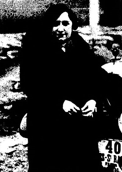 Mme Lietard (ici en 1932 au rallye Paris-St Raphael féminin, 3ème au classement général, 1ère ex-aequo en 2ème catégorie).